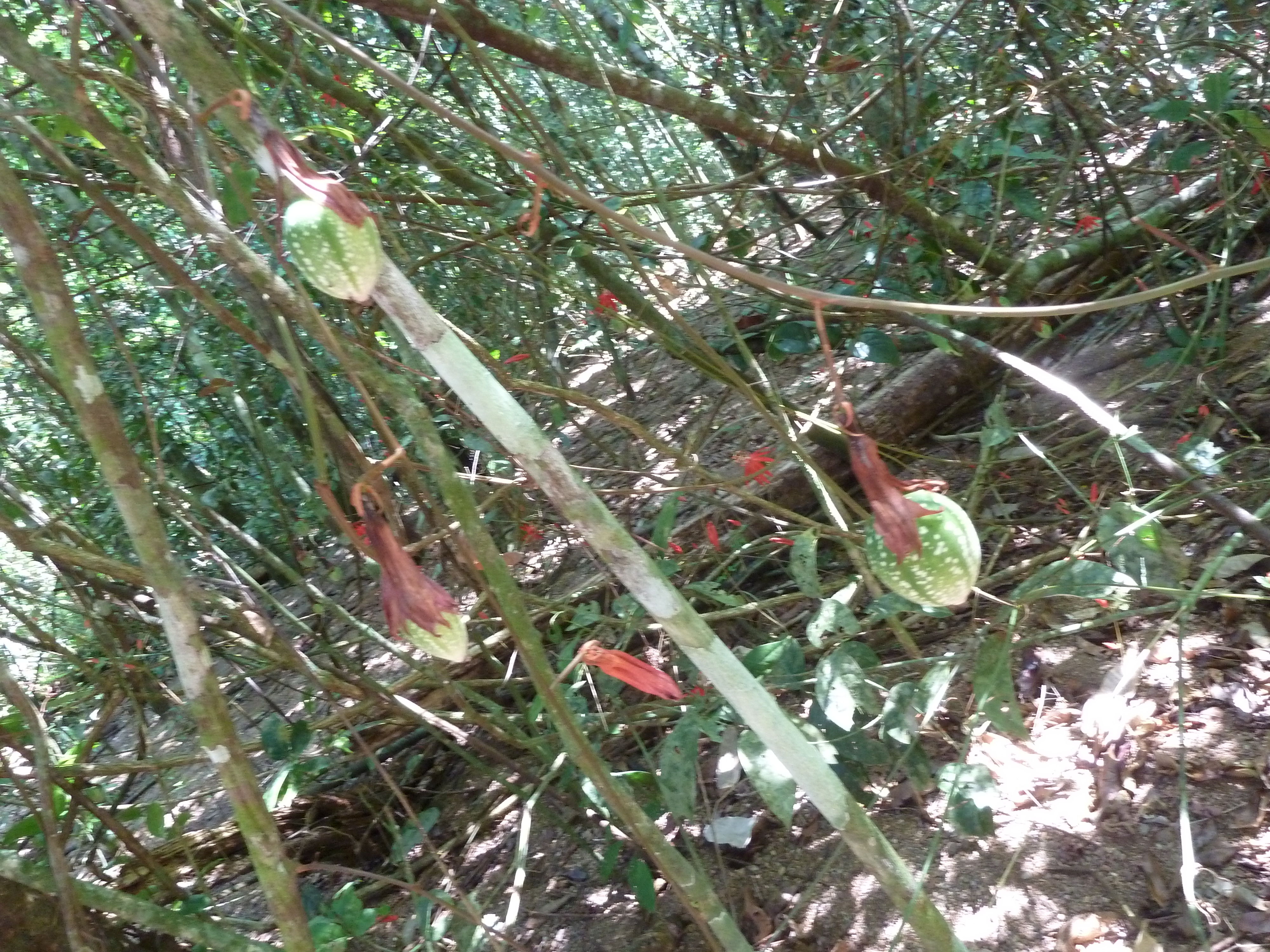 Fruits de la Passiflore a feuille de vigne - Parc Corcovado au Costa-Rica